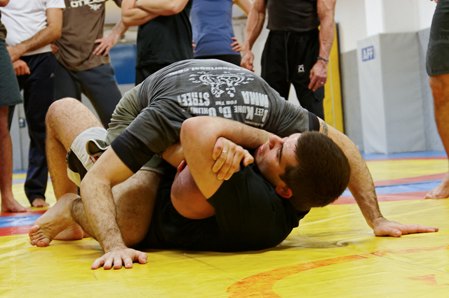 Imagen de 2 luchadores de Luta Livre en acción.